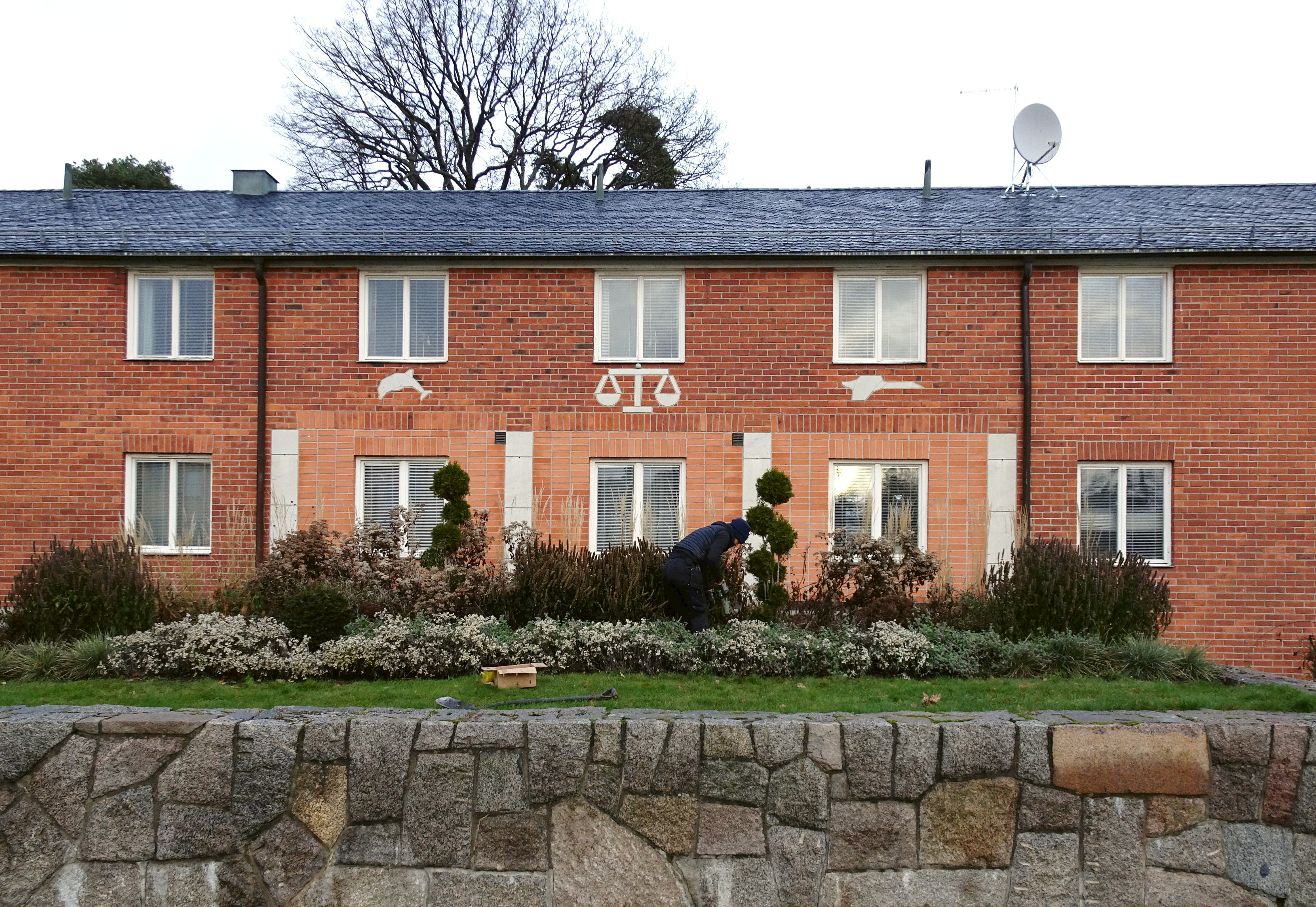 Vår gård hotellänga